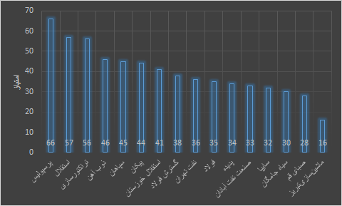 نمودار امتیازات لیگ برتر ایران